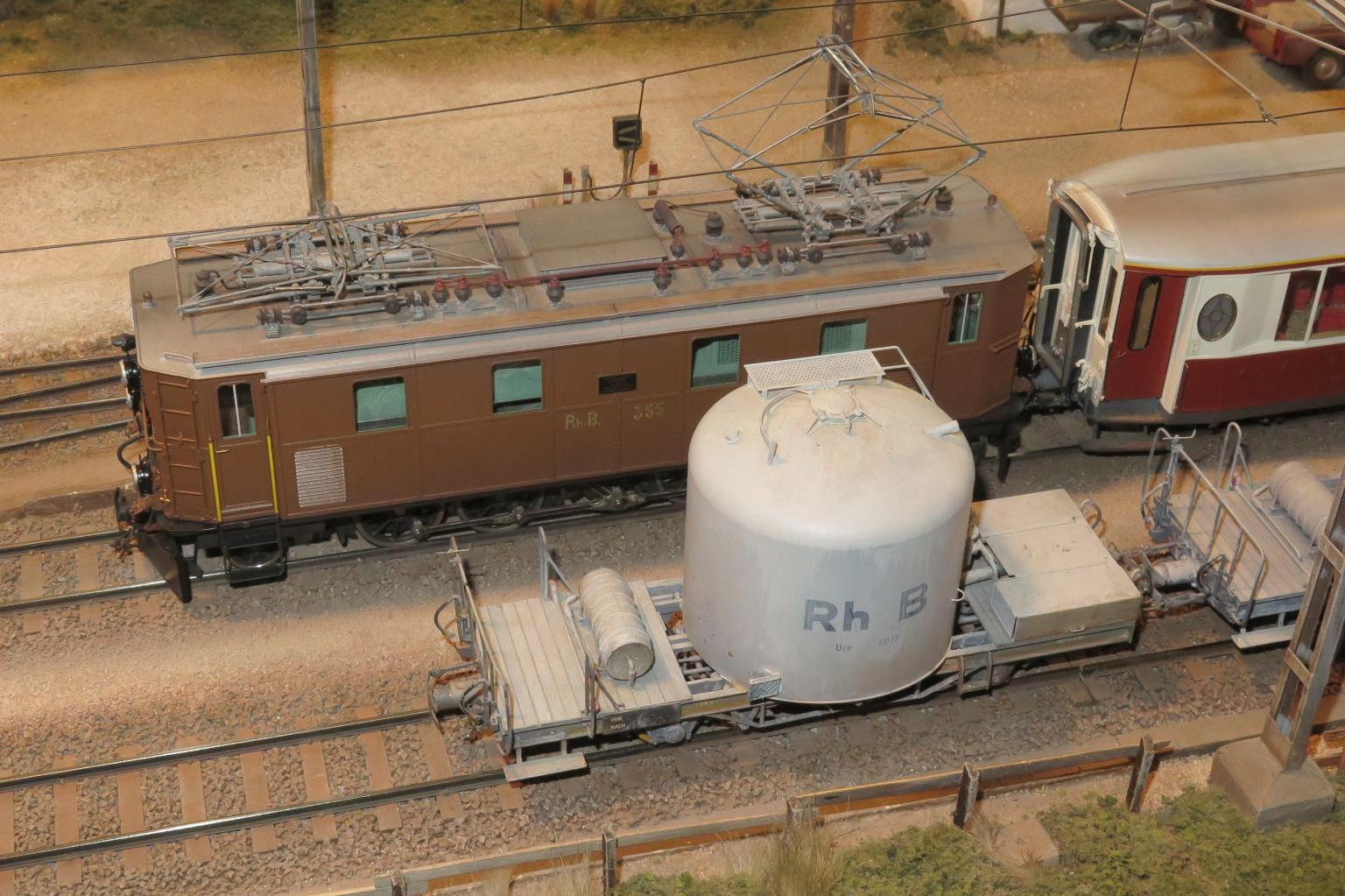 Detail der Spur 0m Modelleisenbahn-Anlage von Bernhard Tarnutzer im Bahnmuseum Albula in Bergün im August 2014. Das Bild zeigt unter anderem eine Ge 4/6 der Rhätischen Bahn (RhB).